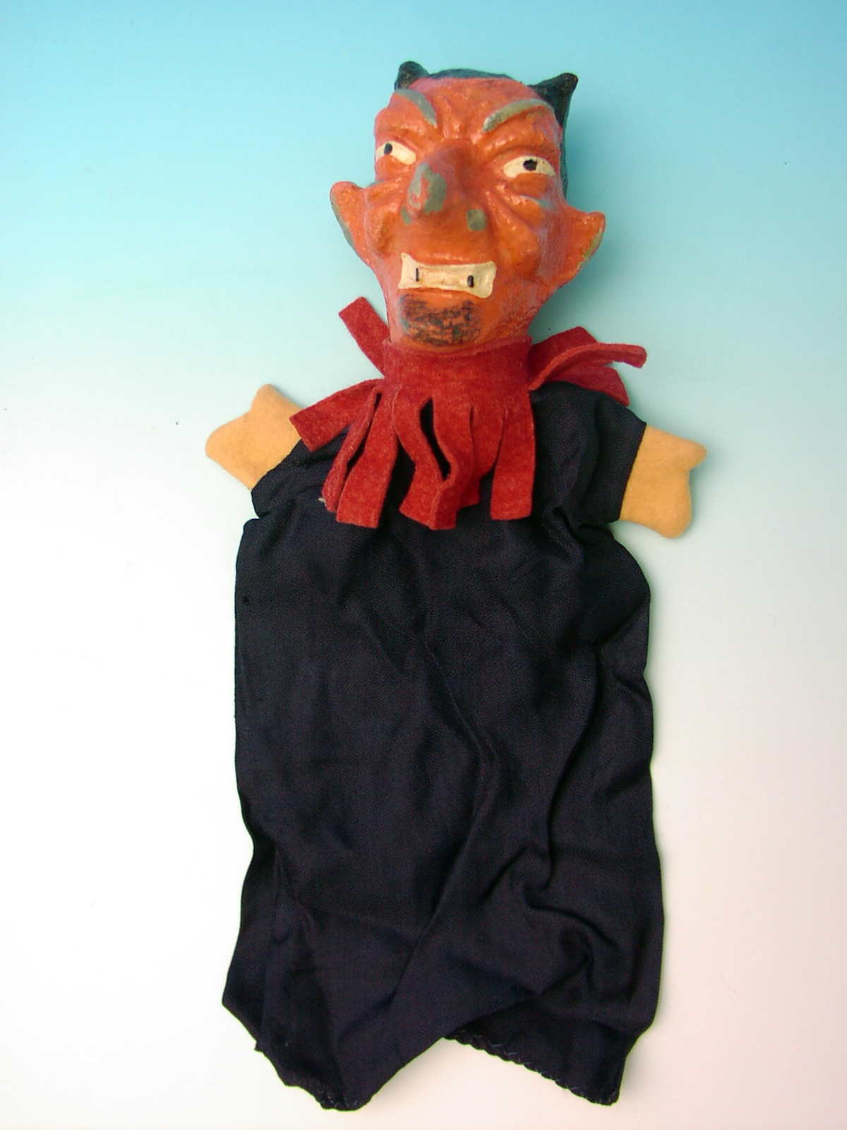 Kasperlefigur "Teufel", Dauerausstellung Fichtelgebirgsmuseum, Fichtelgebirgsmuseum 2006